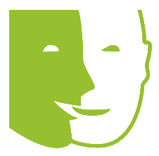 Pictogramme du handicap mental